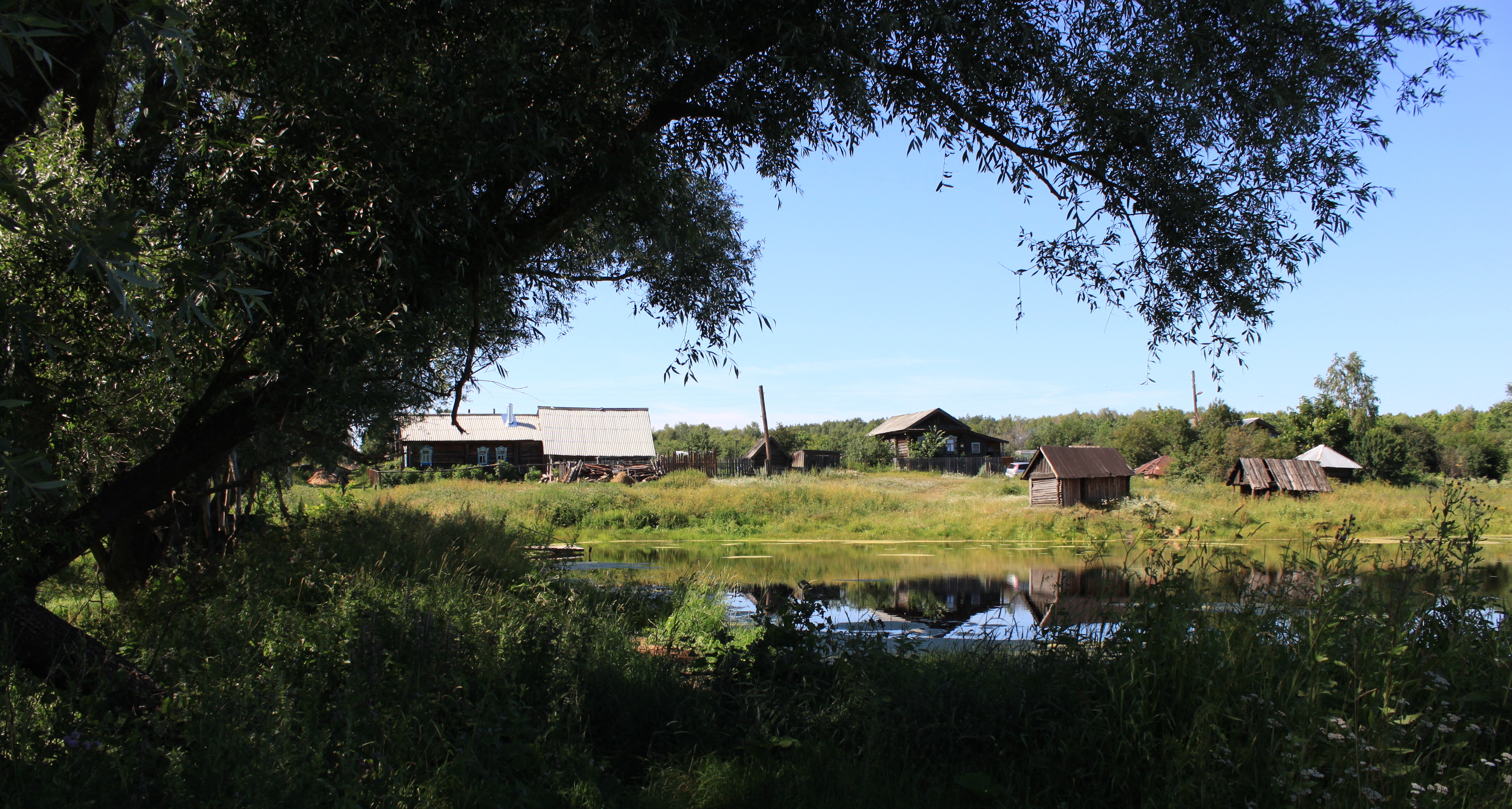 Рождественский Майдан Арзамасский район озеро